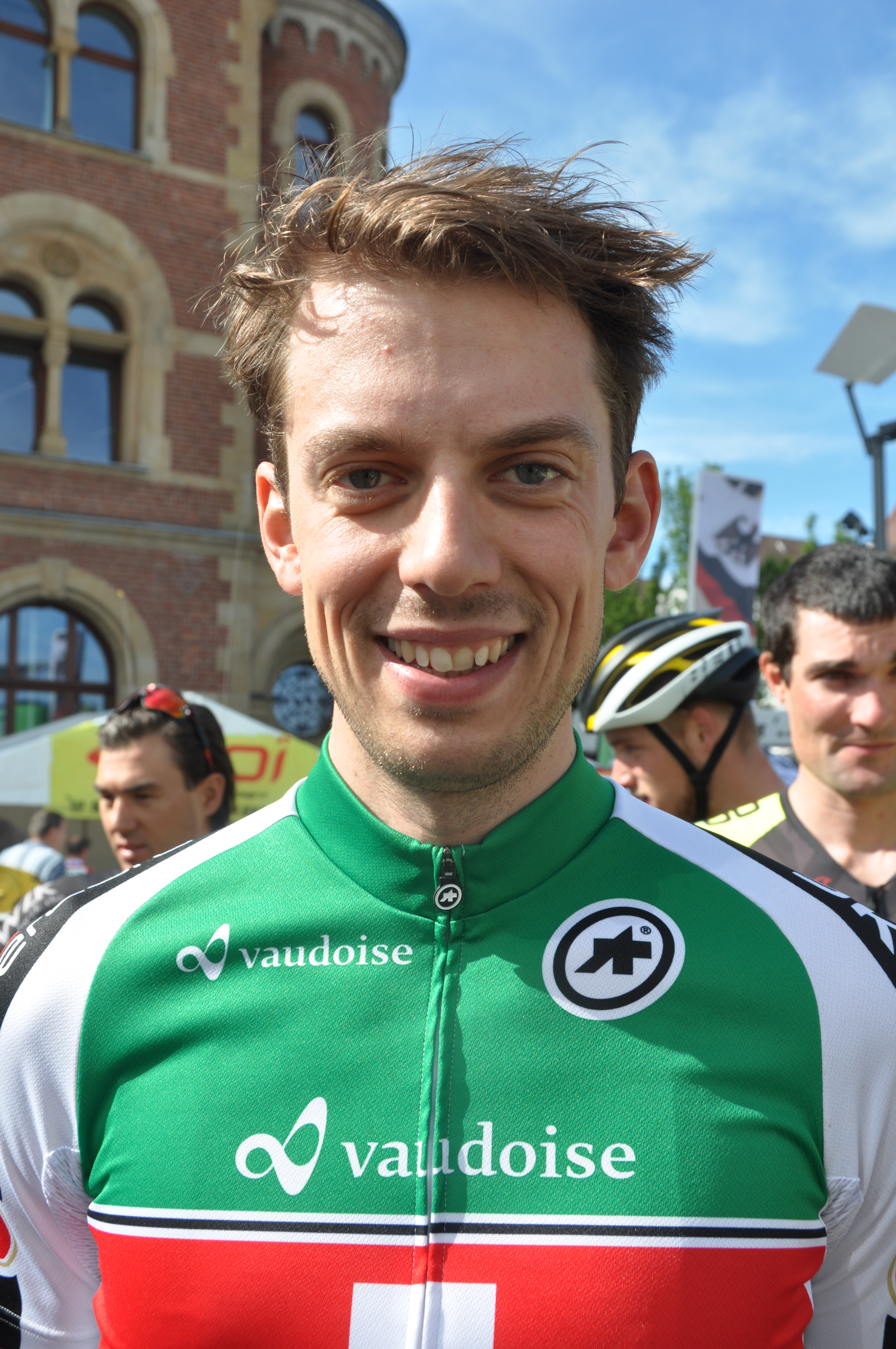 Cyrille Thièry, Schweizer Radrennfahrer